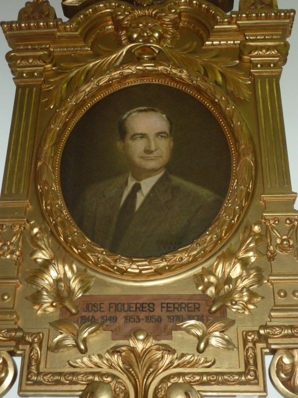 José Figueres Ferrer, Presidente de Costa Rica 1948-1949 / 1953 - 1958 / 1970 - 1974